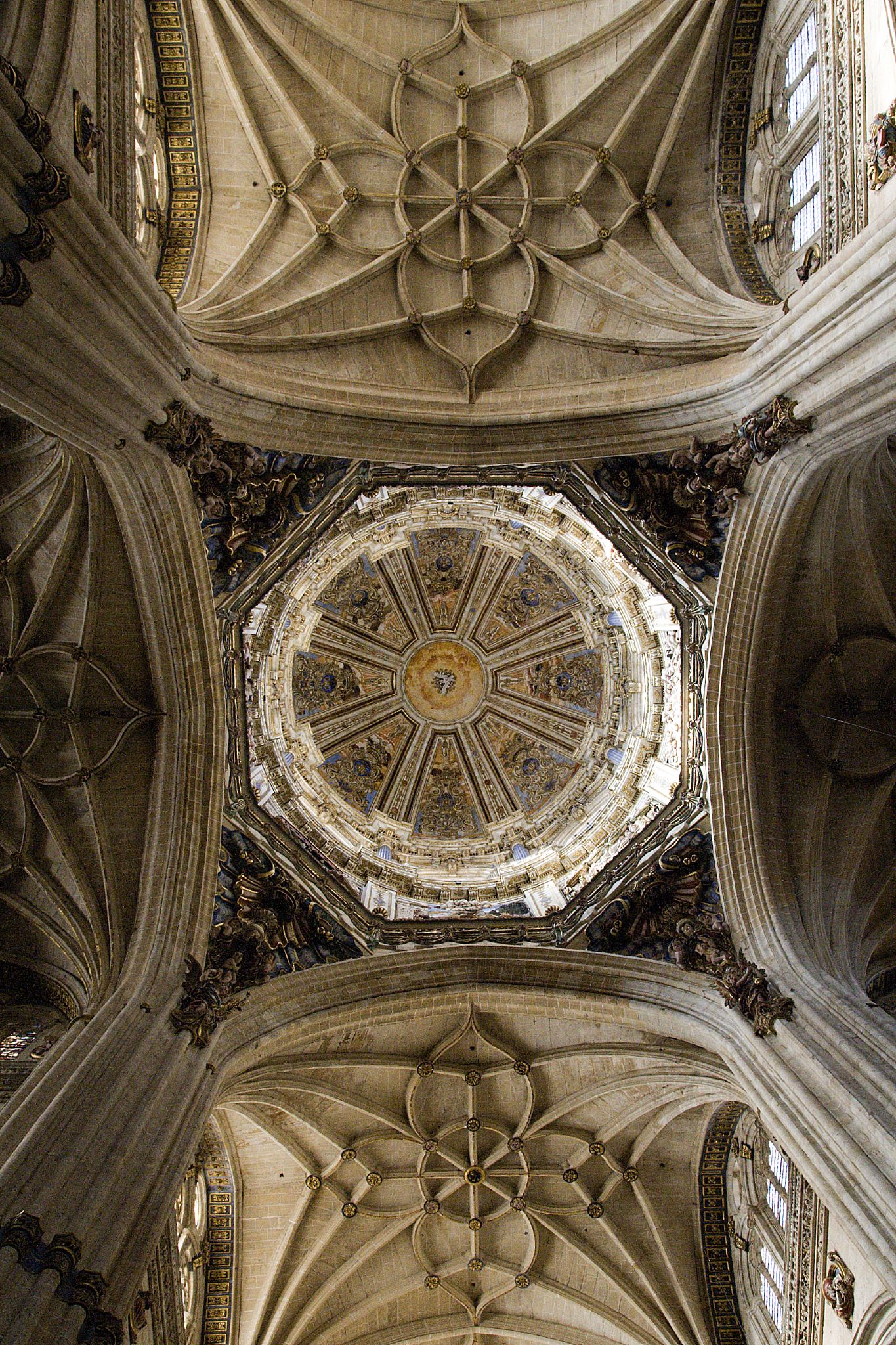 Cúpula de la catedral Nueva de Salamanca, España. 2008.